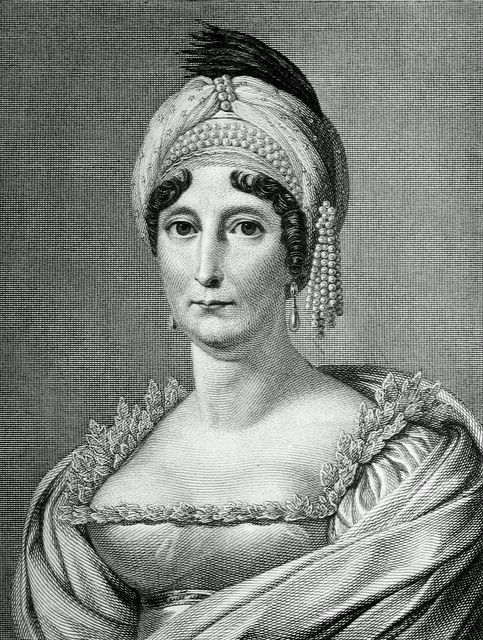 Retrato de Letizia Ramolino, madre de Napoleón